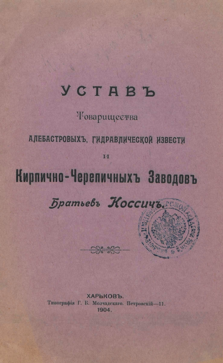 Титульная страница